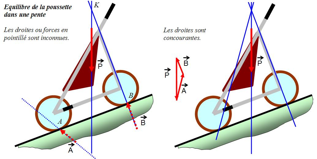 schéma réalisésous word dont je suis l'auteur.